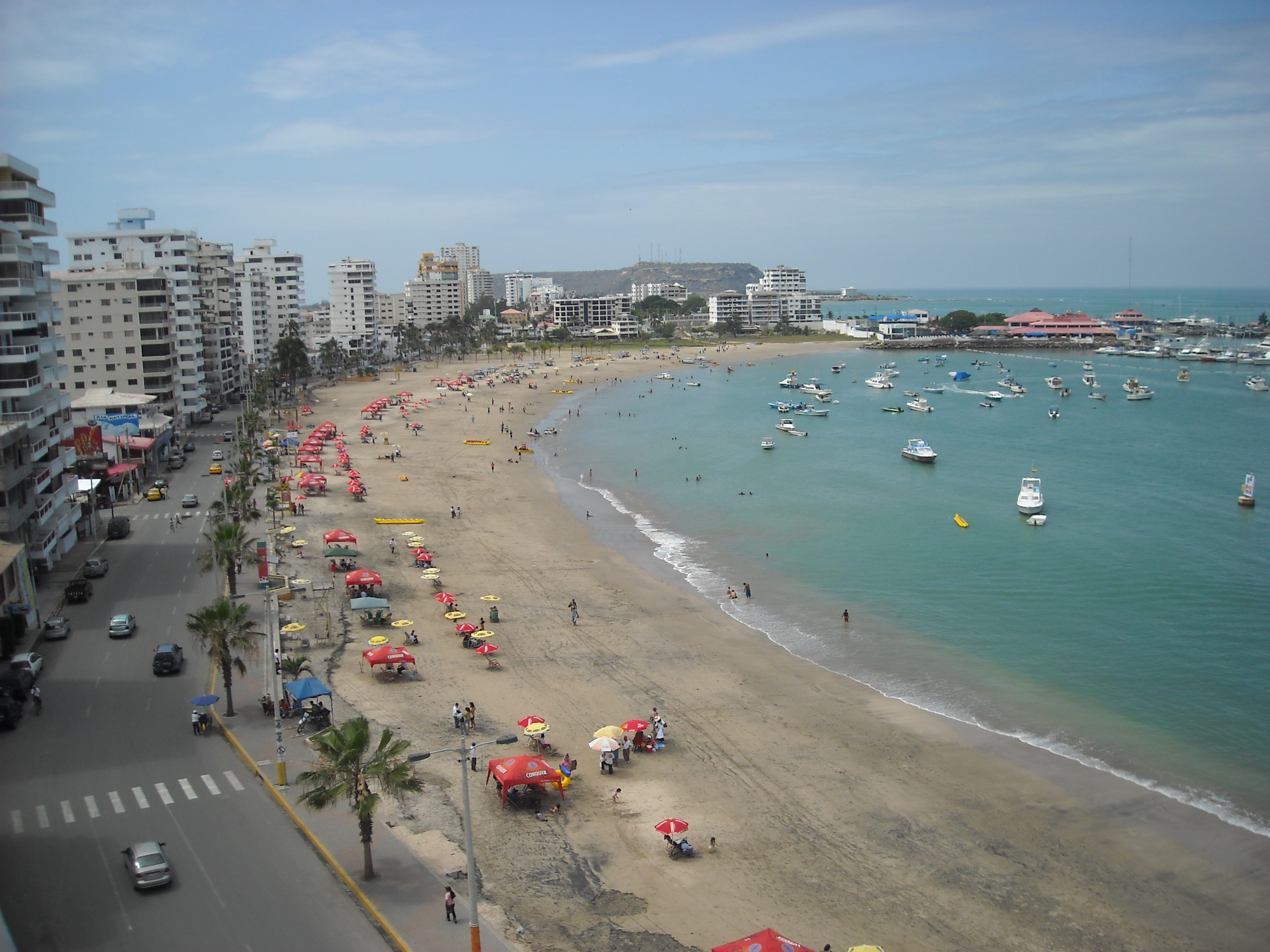 Vista de la playa de Salinas desde el quinto piso del departamento, enero 2010